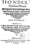 Honderd Psalmen Davids, Jan Utenhove, Londen, 1561